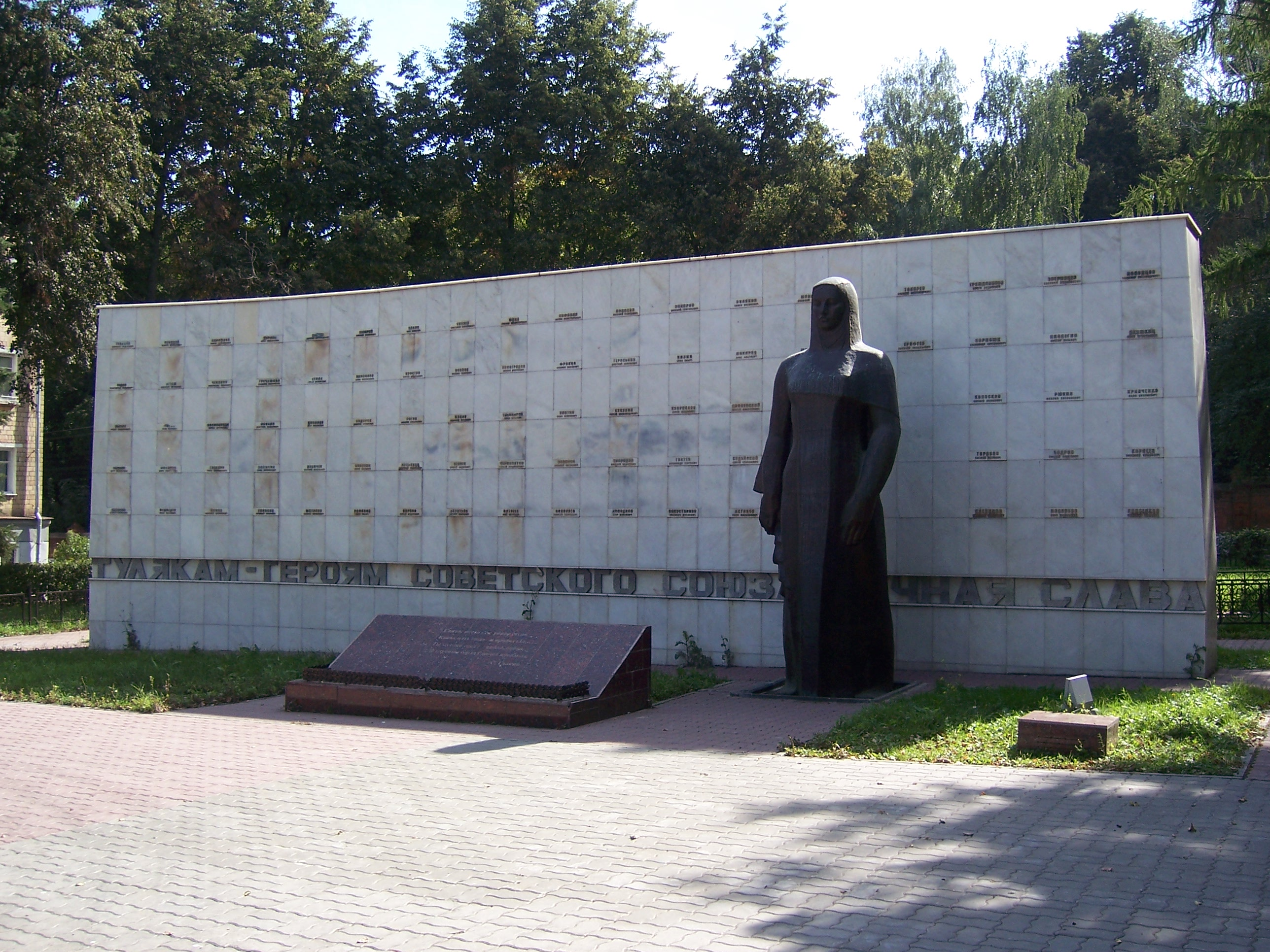 Стела тулякам-Героям Советского Союза на проспекте Ленина в Туле